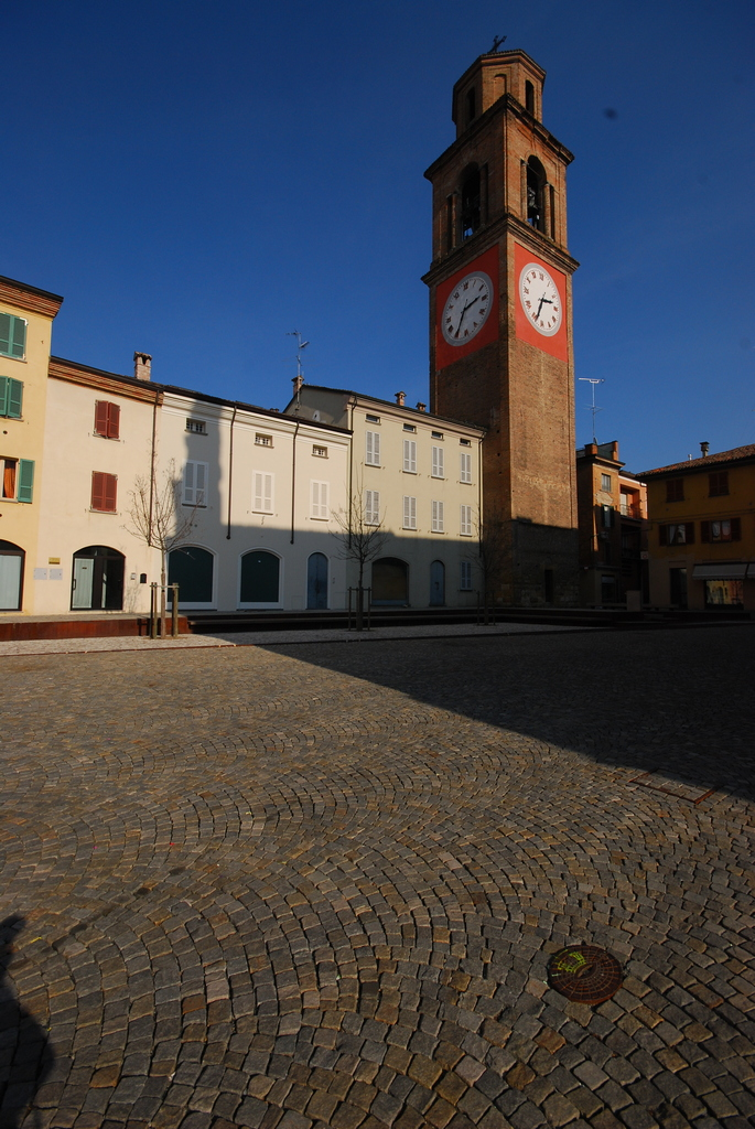 Piazza e campanile